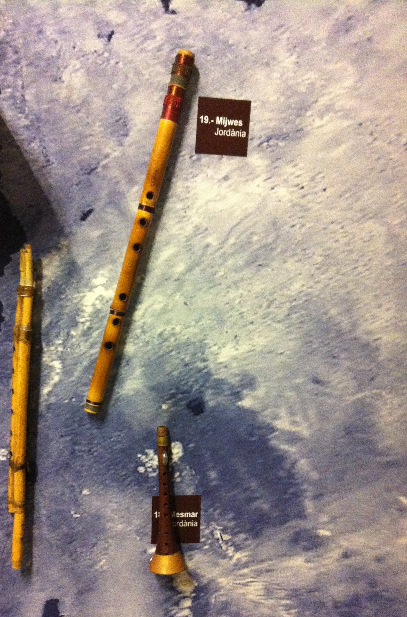 Museu de la Mediterrània de Torroella de Montgrí